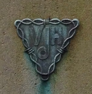 Gedenkstätte Kriegsgefangenschaft und Vertreibung (Goslar); Signet des Verband der Heimkehrer, Kriegsgefangenen und Vermisstenangehörigen Deutschlands